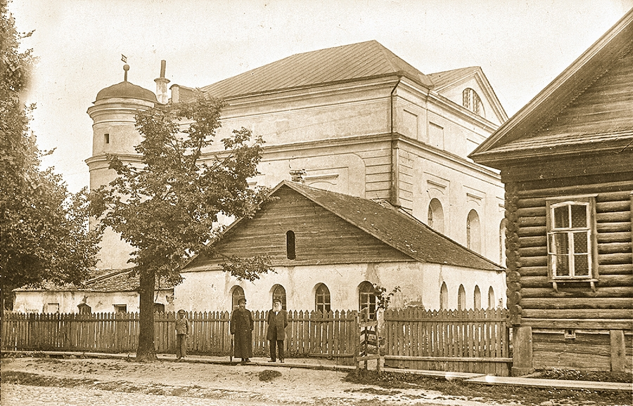 Беларуская (тарашкевіца): Быхаў (Bychaŭ), рог пляцу Рынку (plac Rynak) і вуліцы Магілёўскай (vulica Mahiloŭskaja). Сынагога